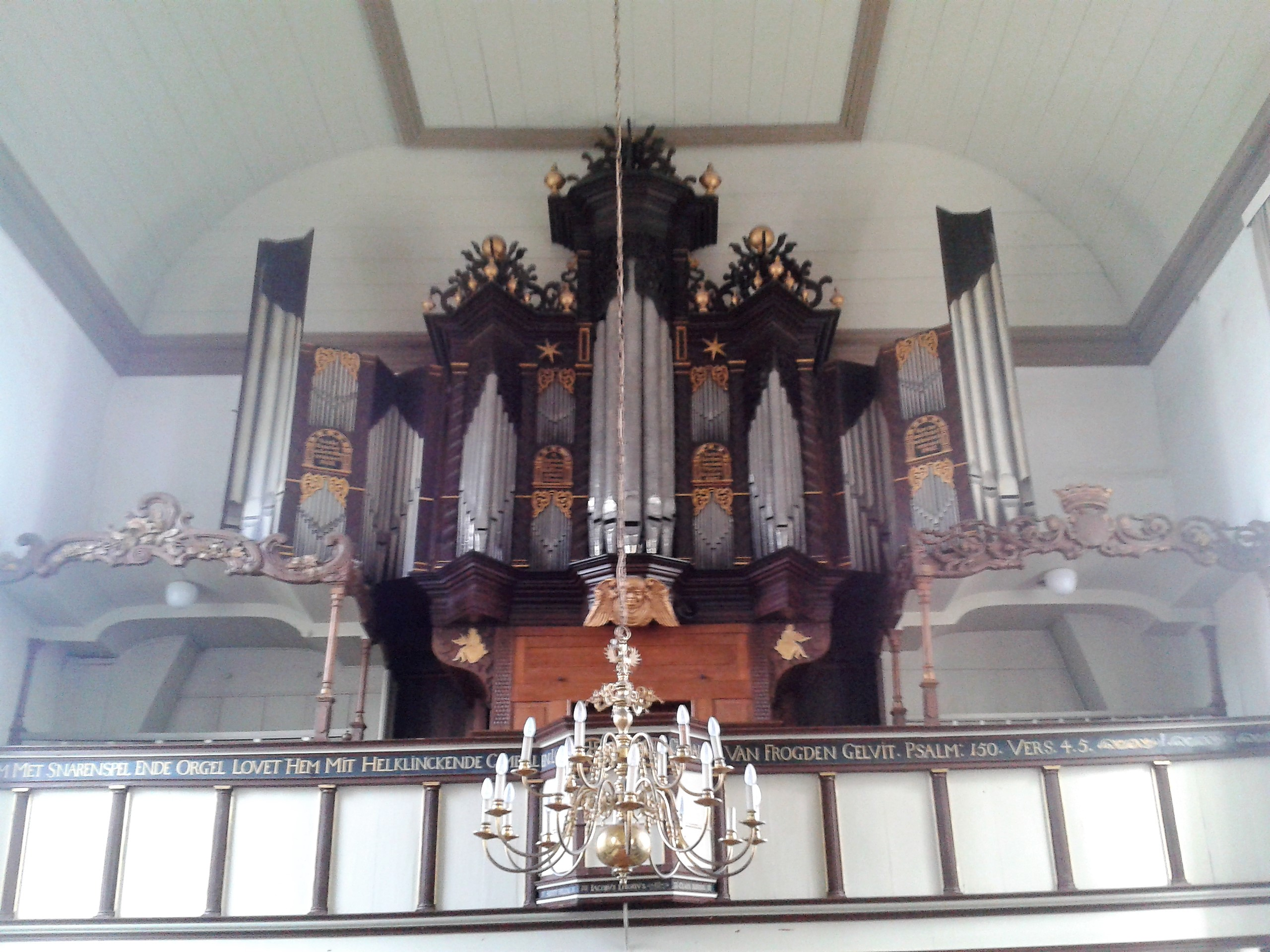 Kirche Visquard, Krummhörn, Landkreis Aurich, Ostfriesland, Deutschland